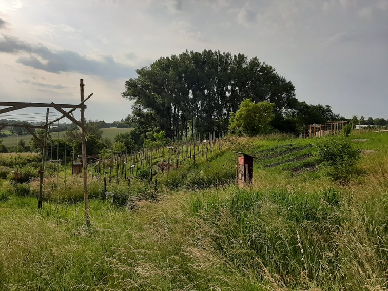 Teilansicht des Gartenbereichs